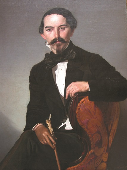 "Ritratto di gentiluomo", olio su tela, 76 × 104 cm., coll. privata